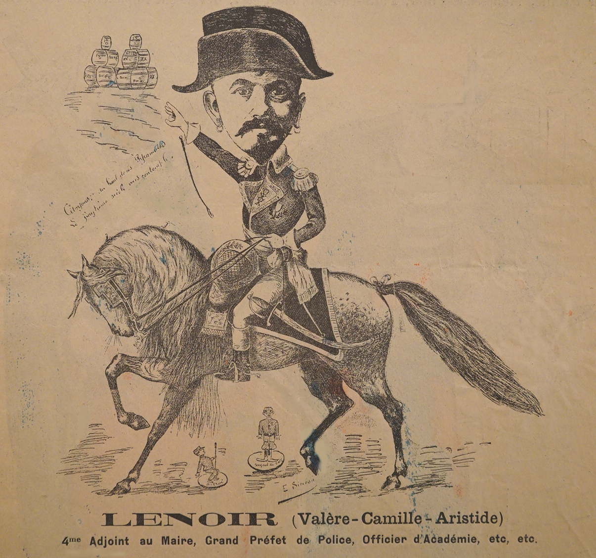 journal l'étrille dans le fond de la bibliothèque de reims.